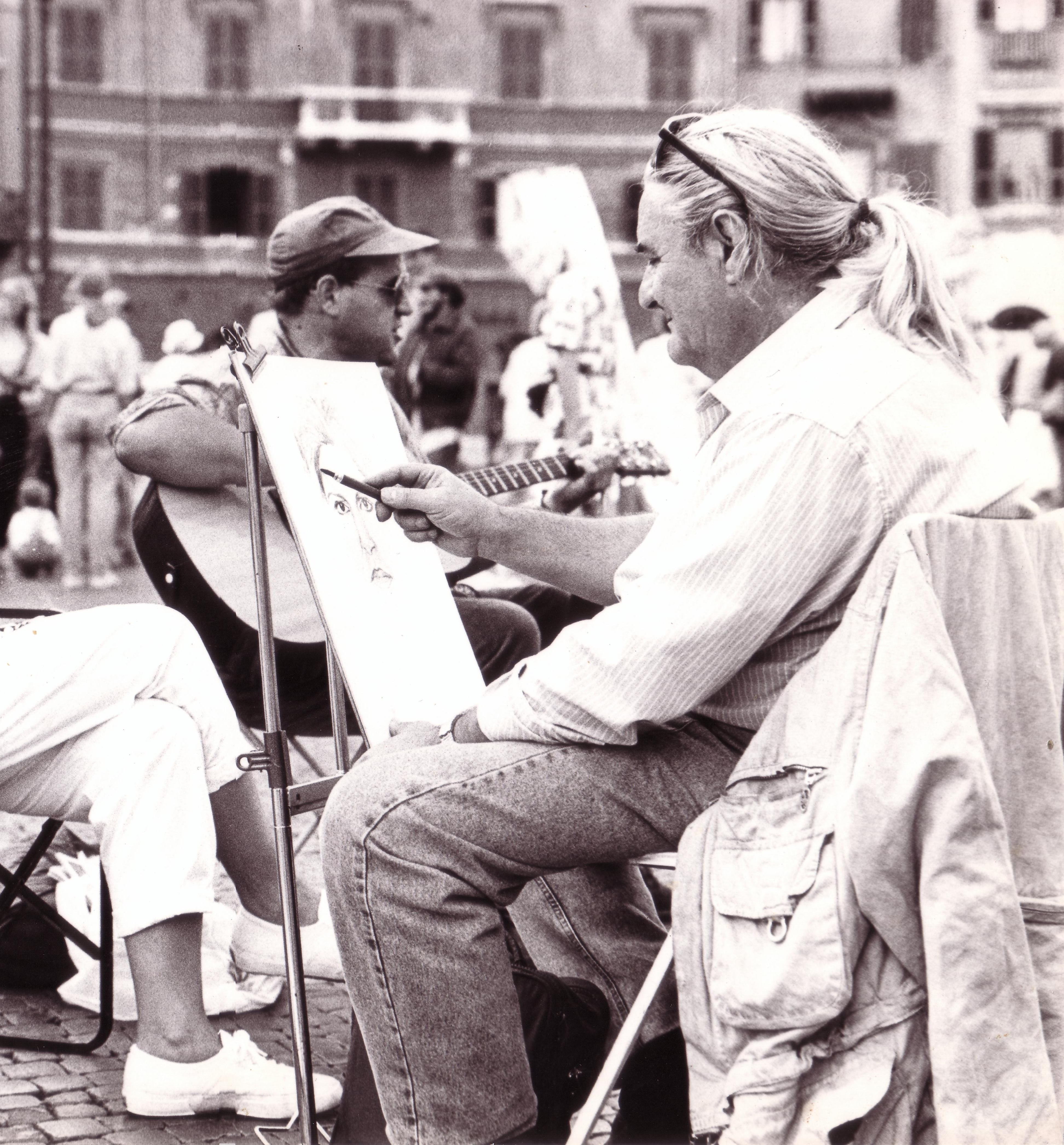 Paolo Salvati (Roma 22 febbraio 1939 - Roma 24 giugno 2014). Street portraitist, Italian painter.